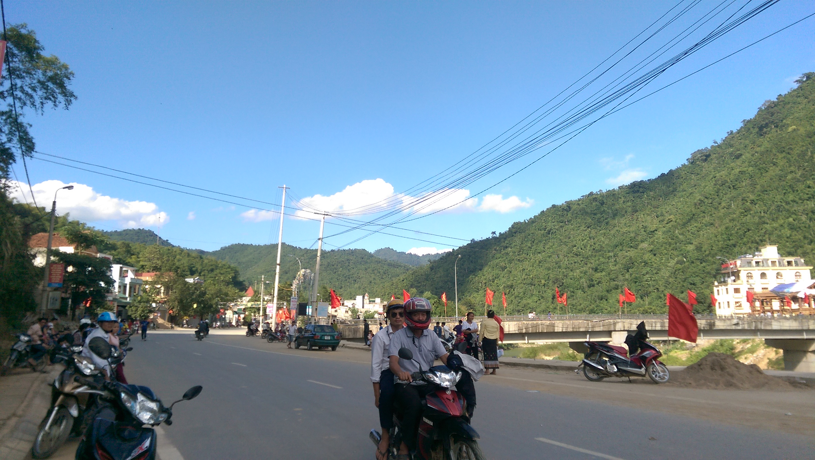 Trung tâm thị trấn Quan Sơn, Thanh Hóa